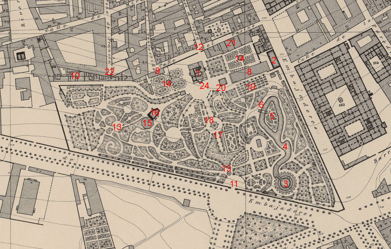 El Casino de la Reina en el Plano Parcelario de Madrid de 1874, realizado por el Instituto Geográfico y dirigido por Carlos Ibáñez e Ibáñez de Ibero: Palacete. Estanque de riegos. Rotonda del dique de la ría con espacios para amarrar las falúas. Ría navegable. Isleta. Puente. Gruta artificial. Estufa grande. Estufa pequeña. Casa de Familia. Puerta principal (Ronda de Toledo). Puerta falsa de carros (puerta de servicio). Fuente con grupo escultórico de Cástor y Polux. Fuente circular y jardines. Rotonda con cúpula para albergar la noria. Baño de caballos. Emparrado. Cenador. Emparrado. Casita rústica. Dependencias de servicio. Acceso a Casa de Familia desde la calle de la Peña de Francia. Estatua. Escalinata de acceso al palacete.